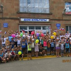 детская программа